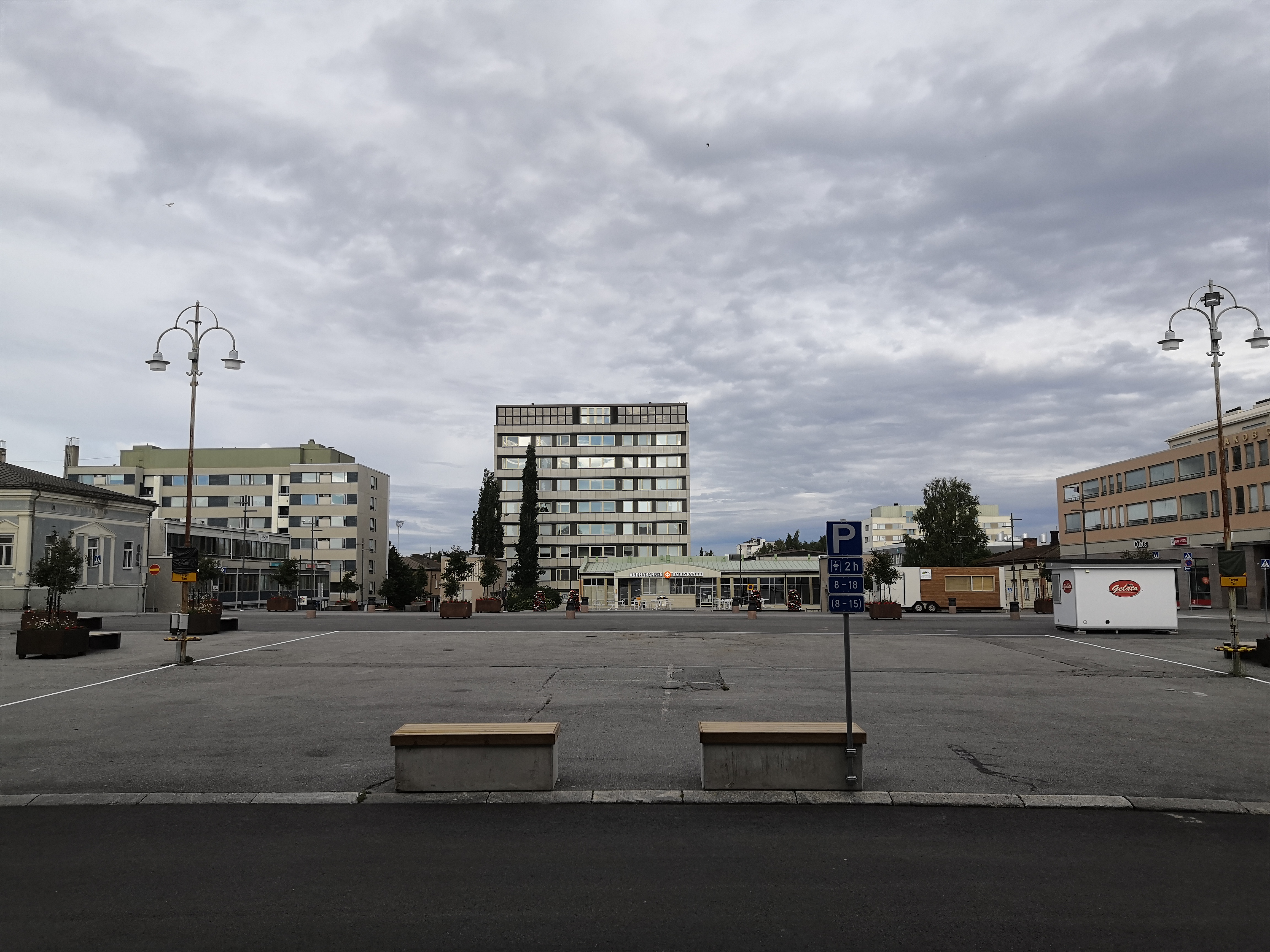 Pietarsaaren tori raatihuoneen rappusilta kuvattuna.